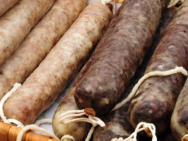 Белая и черная Ботифарра